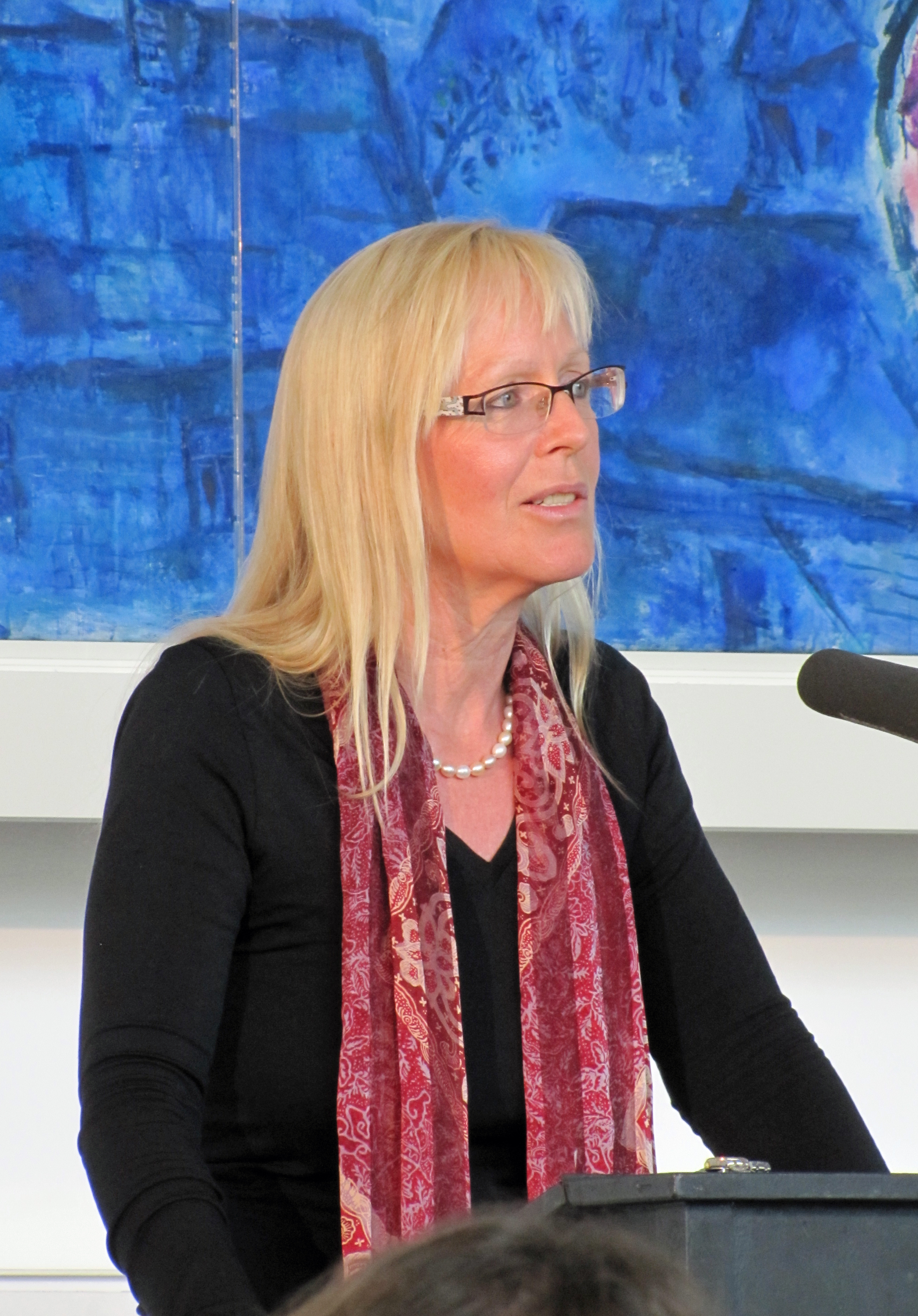 Susanne Schröter, Professorin für „Ethnologie kolonialer und postkolonialer Ordnungen“ an der Uni-Ffm, bei den Römerberggesprächen im April 2014 in Frankfurt am Main.